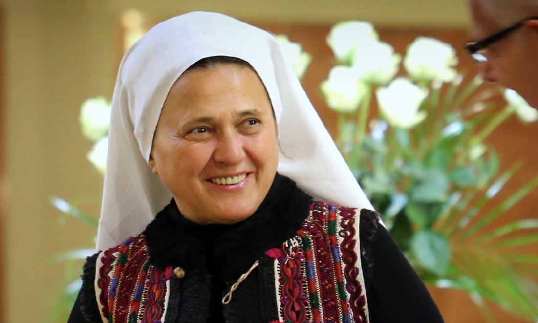 Petrás Mária Máriaremetén